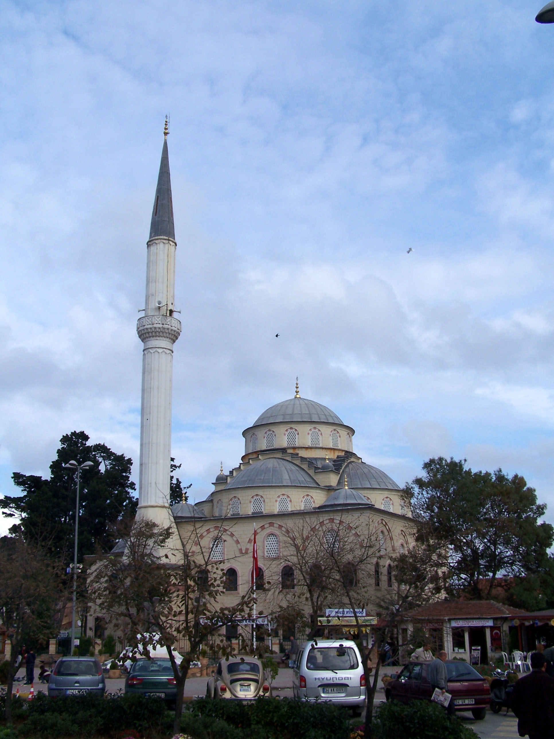 Hüseyin Keçici Şile Merkez Camii in Şile